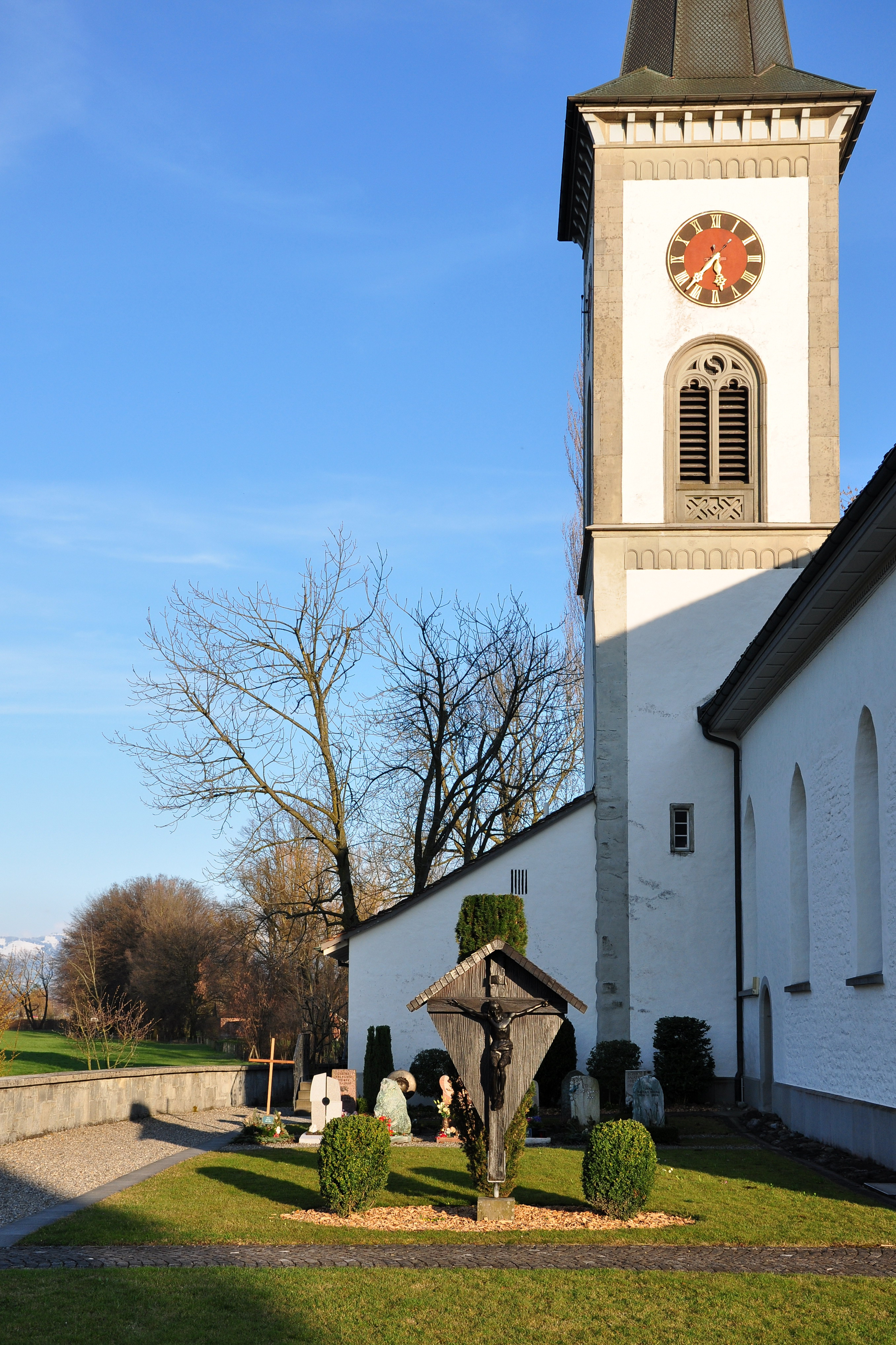 Busskirch in Jona (Switzerland) on Obersee (upper Lake Zürich) shore